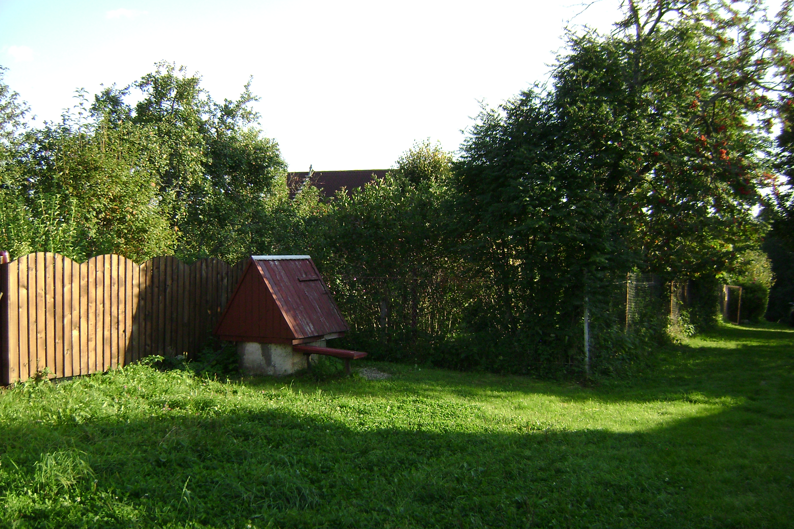 Колодец